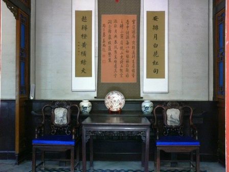 四合院正房明间的陈设 用心阁于2005年4月16日拍摄于恭王府怡神所内